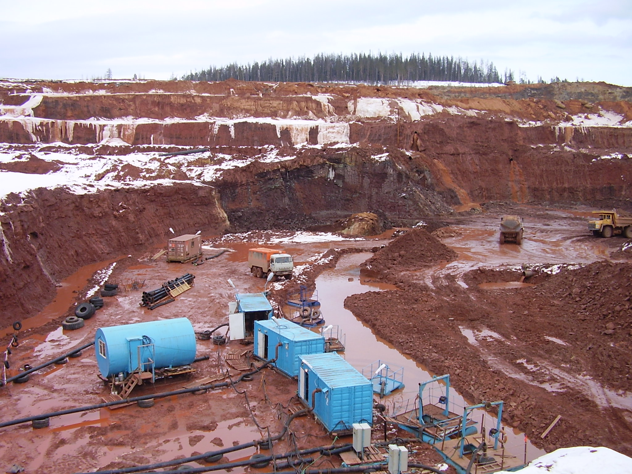 Месторождение алмазов им. М. В. Ломоносова, карьер кимберлитовой трубки Архангельская